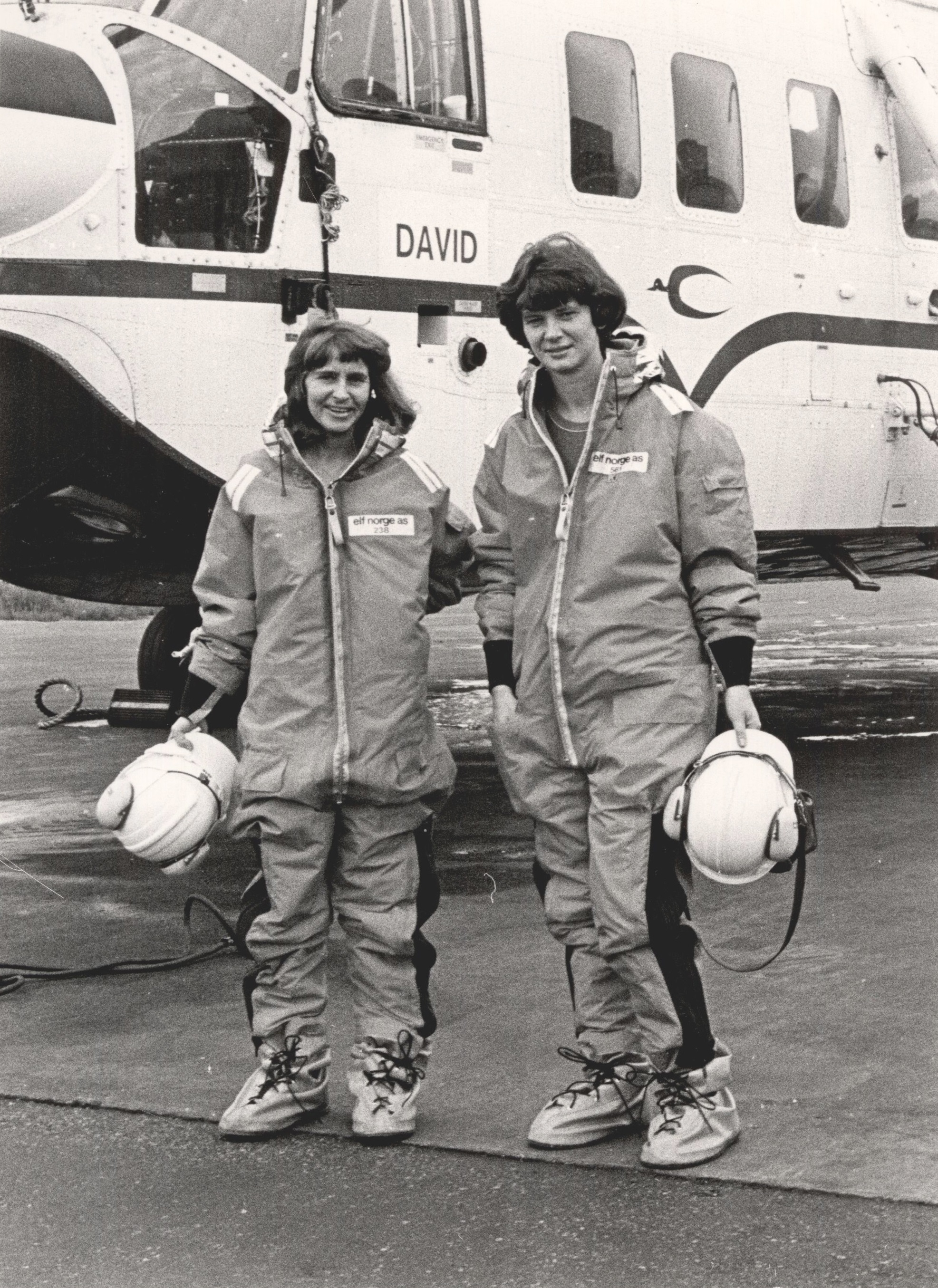 Svanhild Rolfsen t.v. og Marit Høiland foran helikopteret som skal ta dem ut til Friggfeltet. Foto: Total E&P Norge/Norsk Oljemuseum. Helikopter av typen Sikorsky S-61N fra Helikopter Service AS, klengenavnet "David"